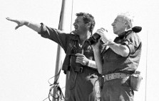 משה דיין, חיים בר לב ודב תמרי.